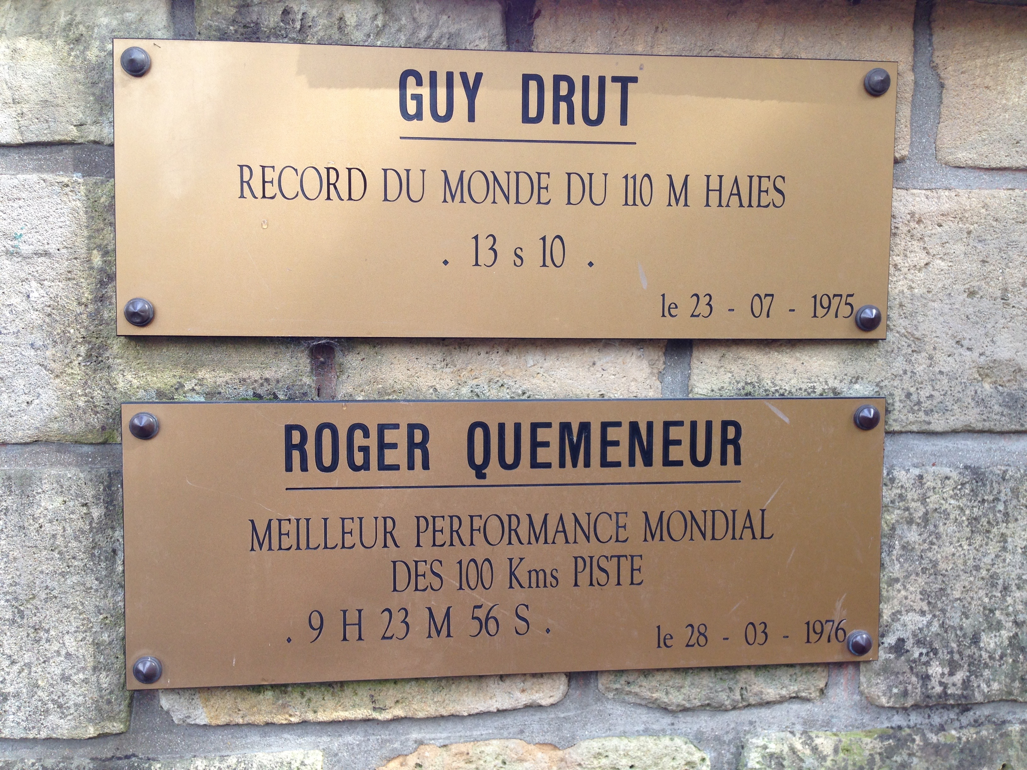 Plaque commémorant les records de Guy Drut (110m haies) et Roger Quémener (marche) sur la piste du stade Chéron (Saint-Maur-des-Fossés)